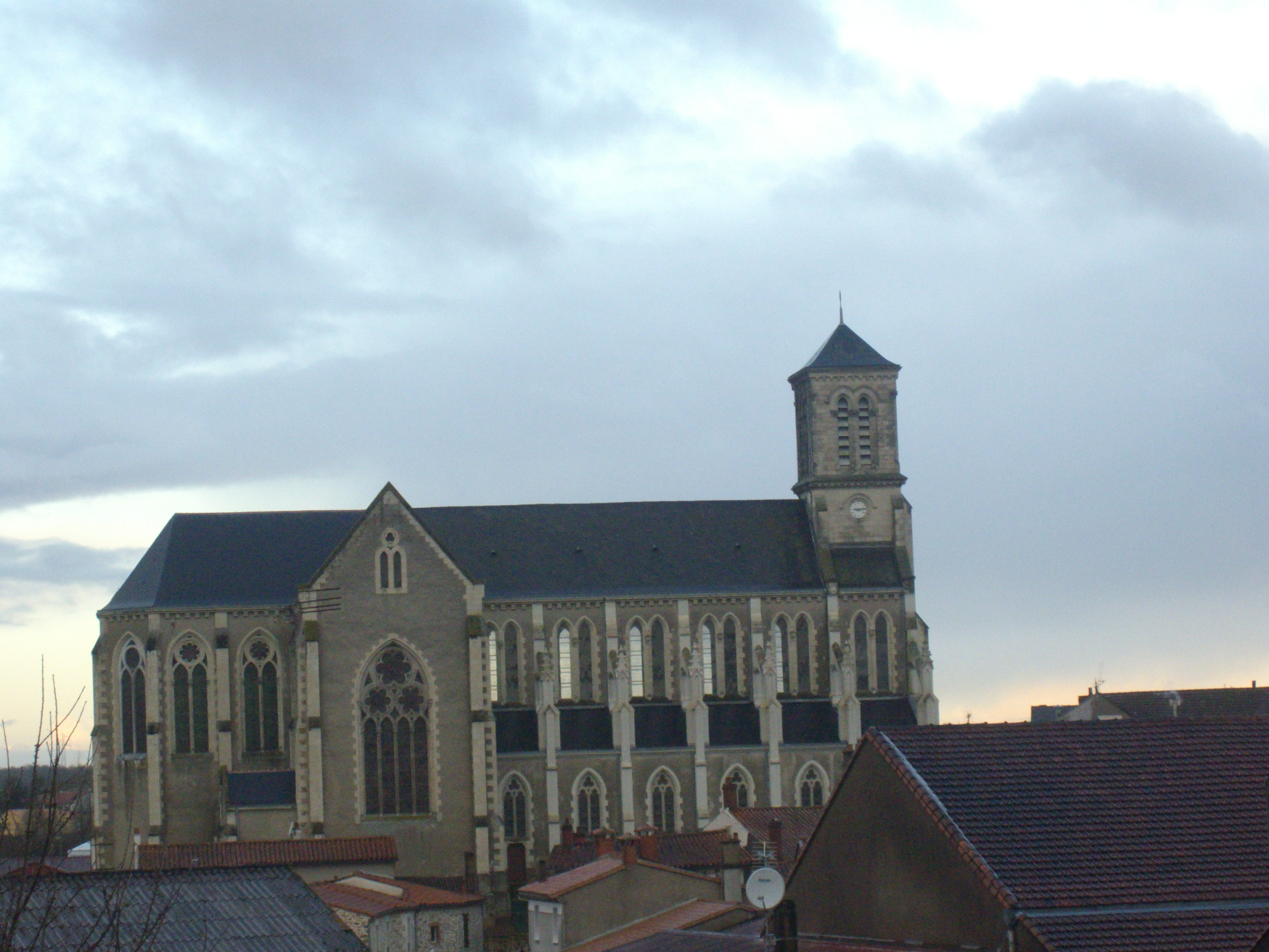 Eglise de Mouzillon